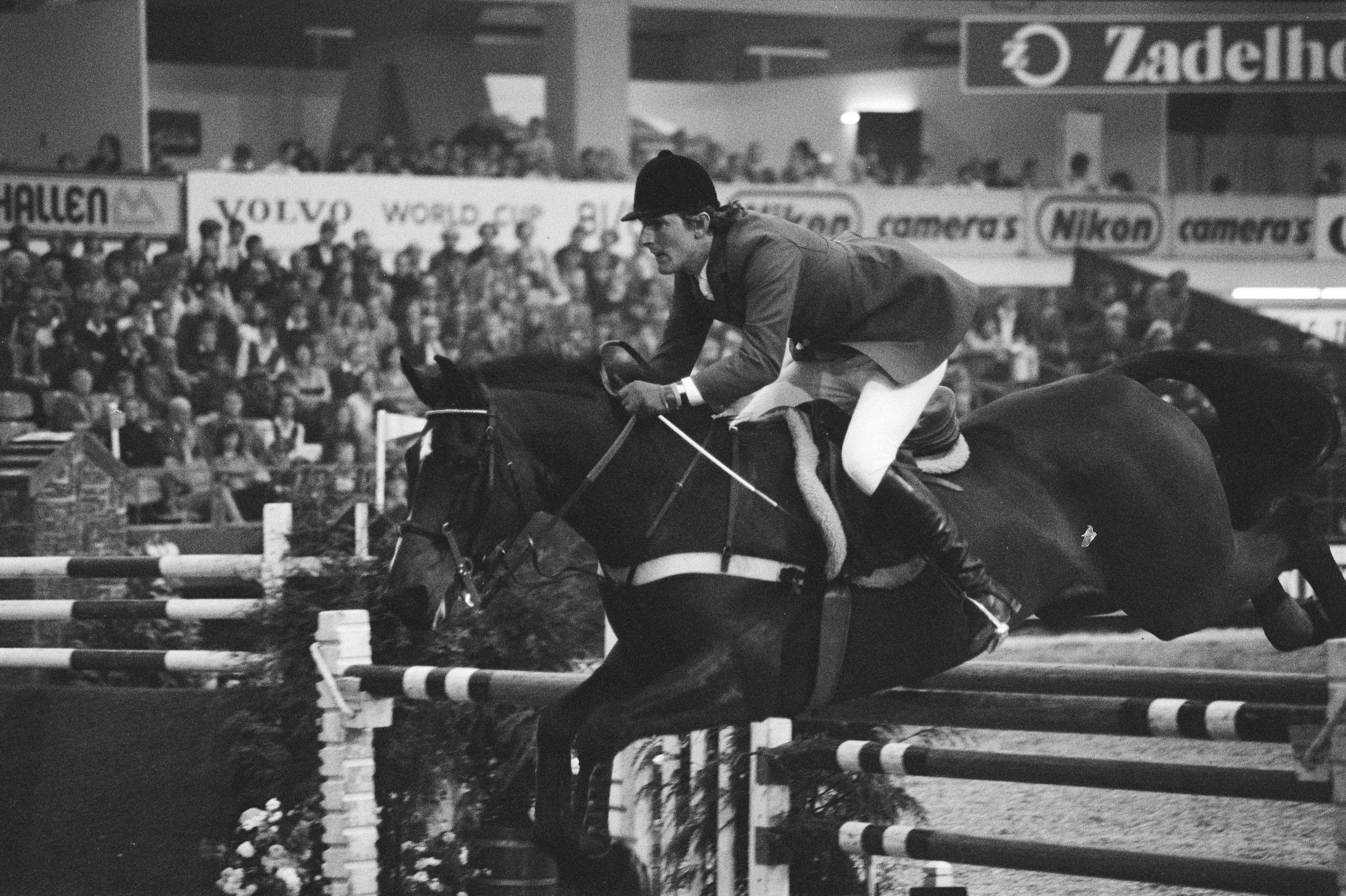 Collectie / Archief : Fotocollectie Anefo Reportage / Serie : Jumping Amsterdam in de RAI; Grote Prijs van Amsterdam Beschrijving : Eric Wauters (België) op U.P.Ubergabe in aktie Datum : 1 november 1981 Locatie : Amsterdam, Noord-Holland Trefwoorden : U.P.Ubergabe (paard), concours hippique Persoonsnaam : Wauters, Eric Instellingsnaam : Jumping Amsterdam Fotograaf : Antonisse, Marcel / Anefo Auteursrechthebbende : Nationaal Archief Materiaalsoort : Negatief (zwart/wit) Nummer archiefinventaris : bekijk toegang 2.24.01.05 Bestanddeelnummer : 931-7781